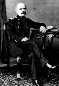 Геннадий Иванович Невельской в чине вице-адмирала (т.е. между 1864 и 1874 гг.)